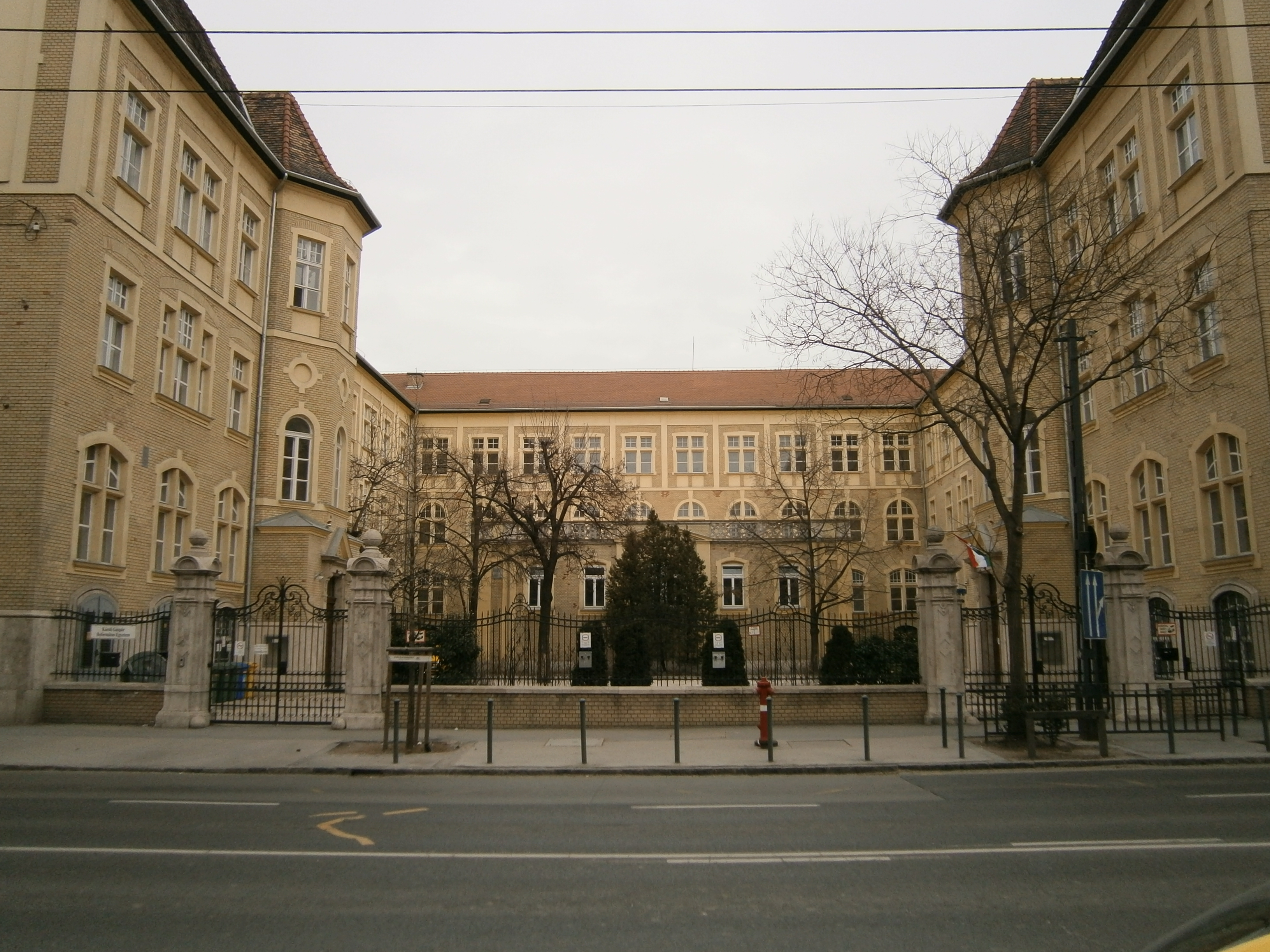 KRE BTK Dózsa György úti épülete, Budapest, XIV. kerület